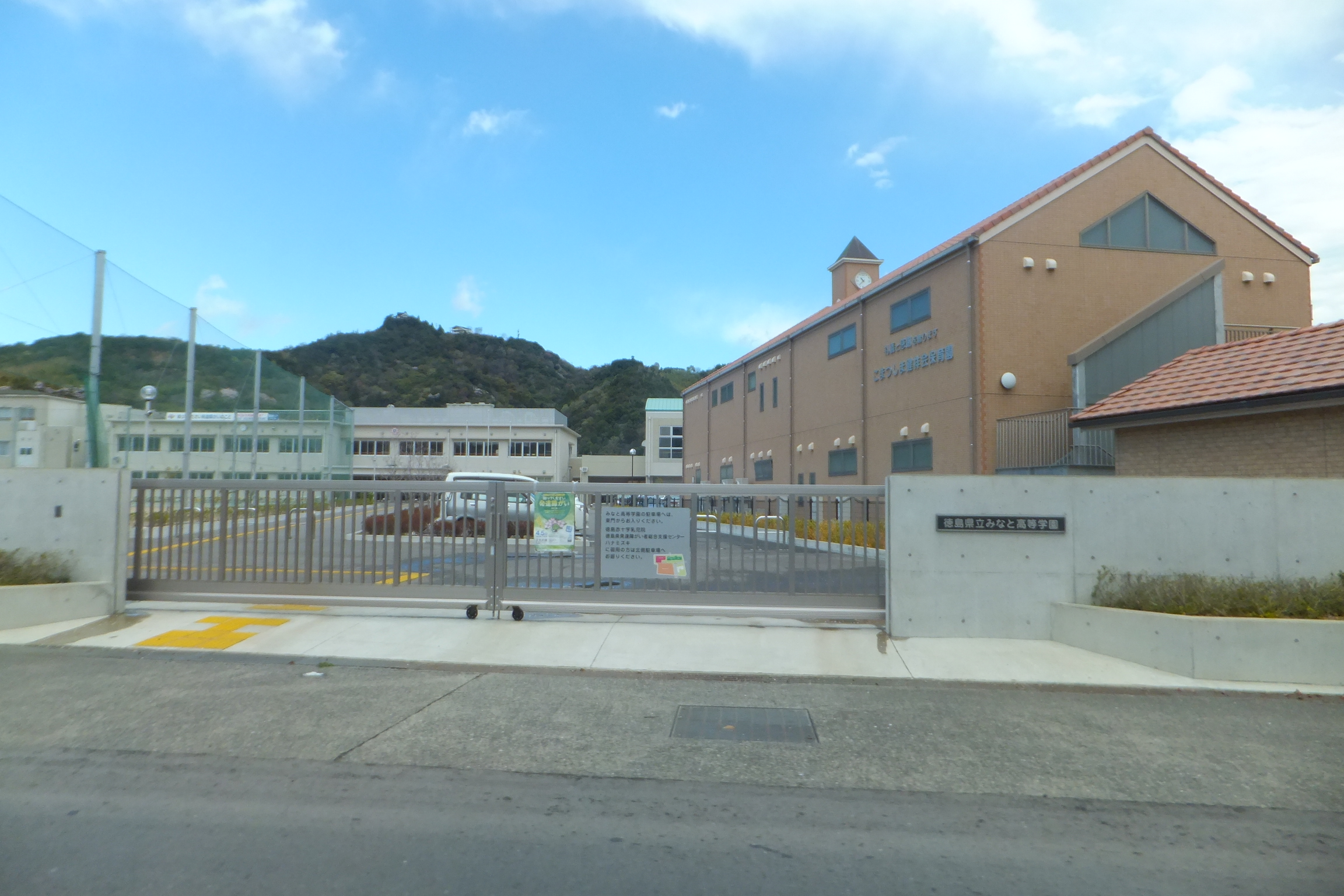 徳島県立みなと特別支援学校